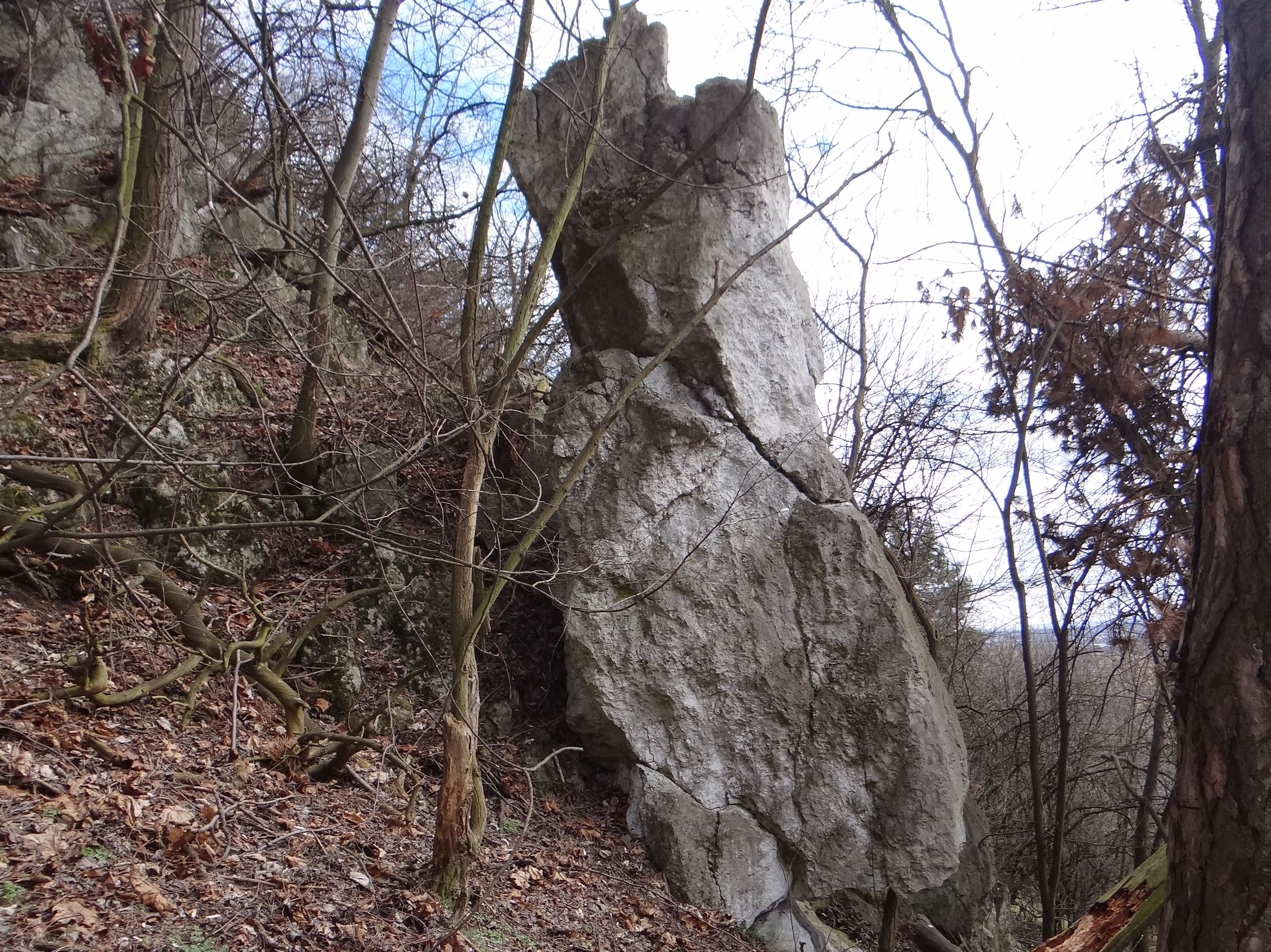 Karniowskie Skały